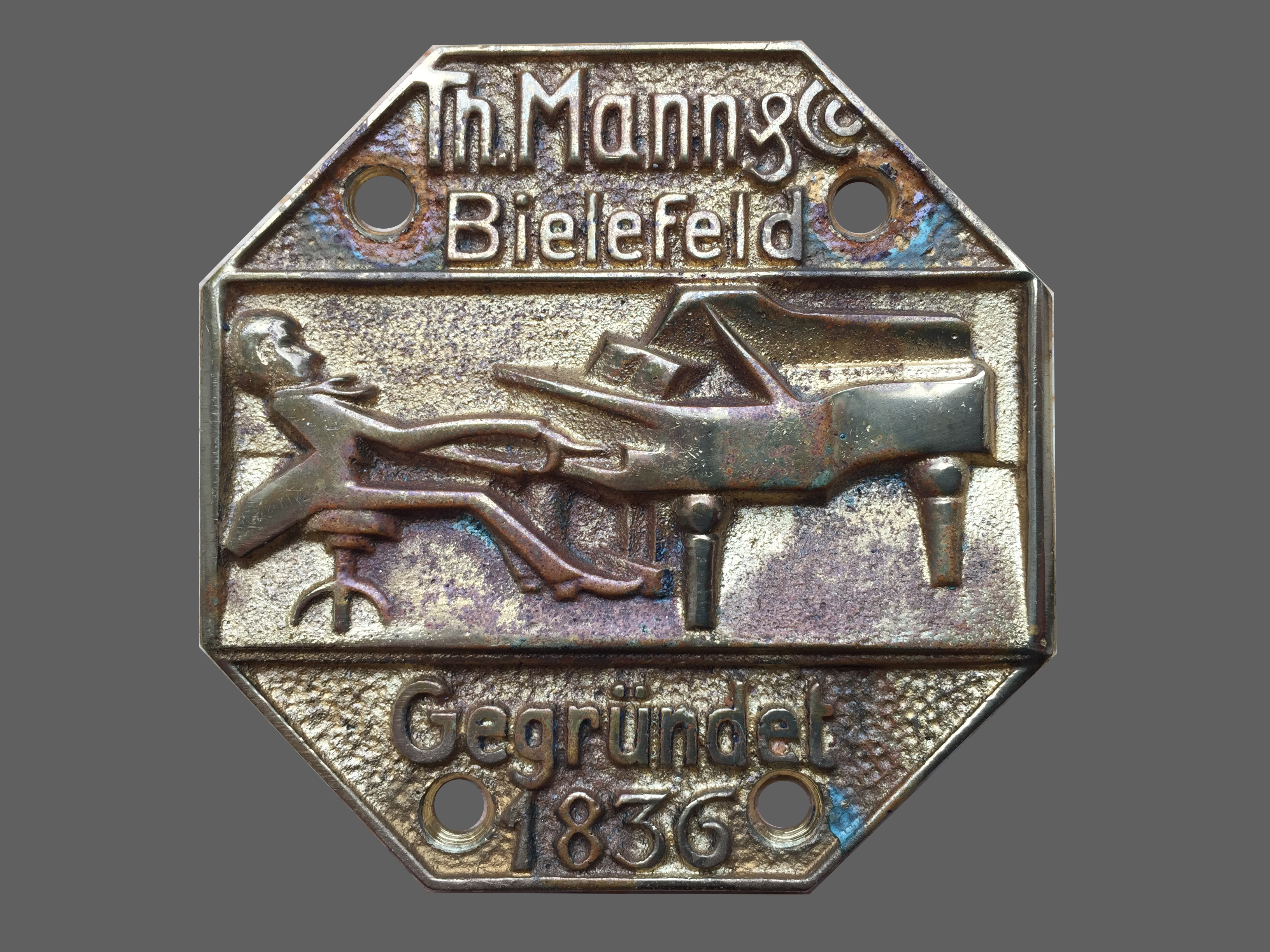 Firmenemblem auf dem Klavier mit der Seriennummer 18532.